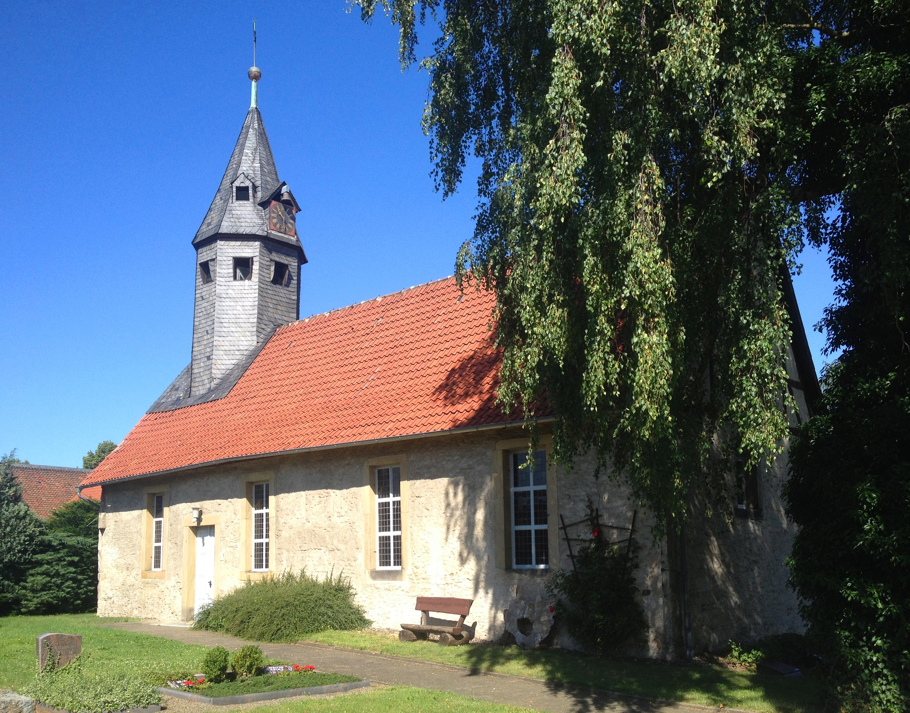 Kirche in Wehre (Schladen-Werla)